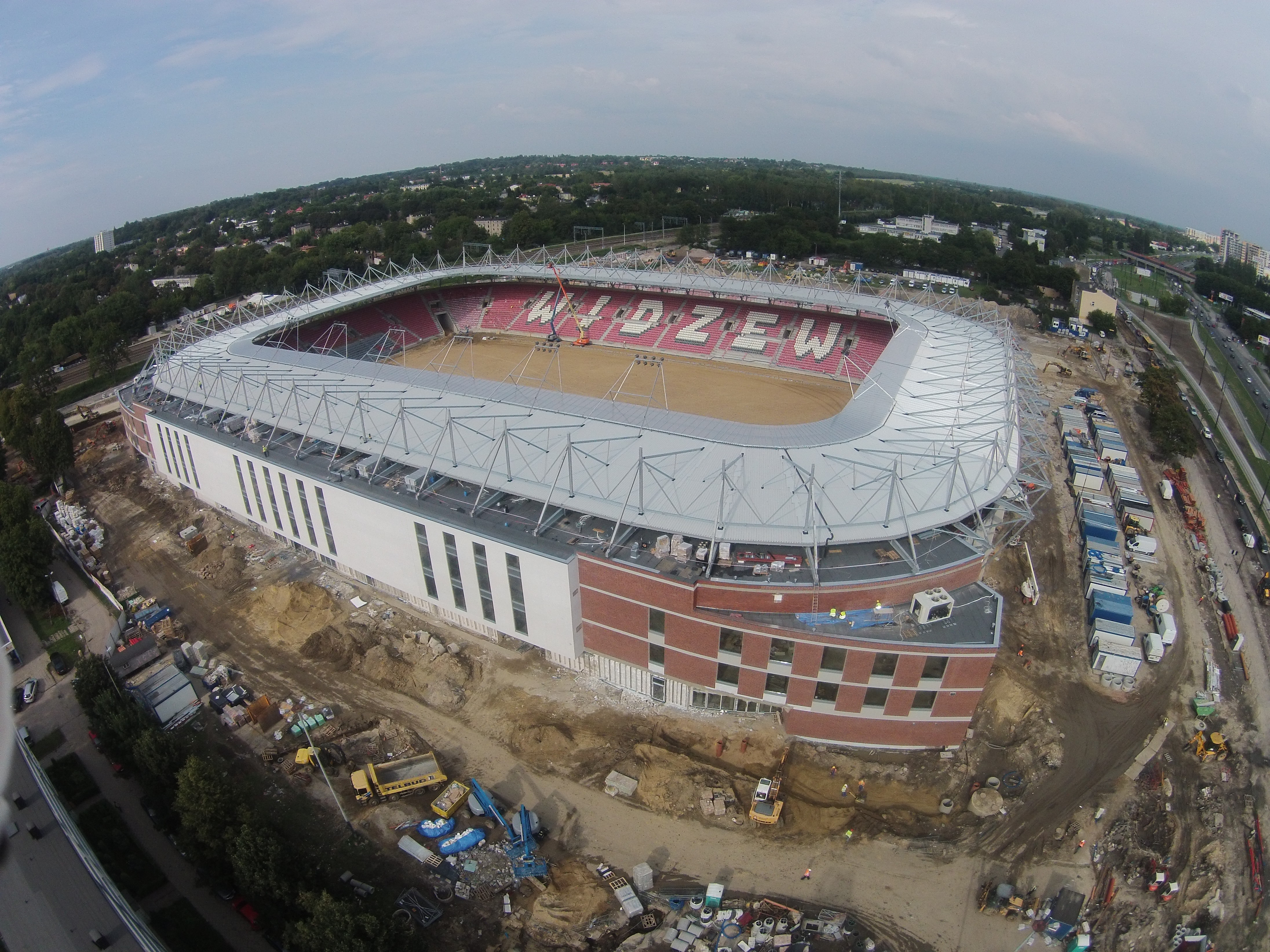 Budowa stadionu na Widzewie dobiega końca.